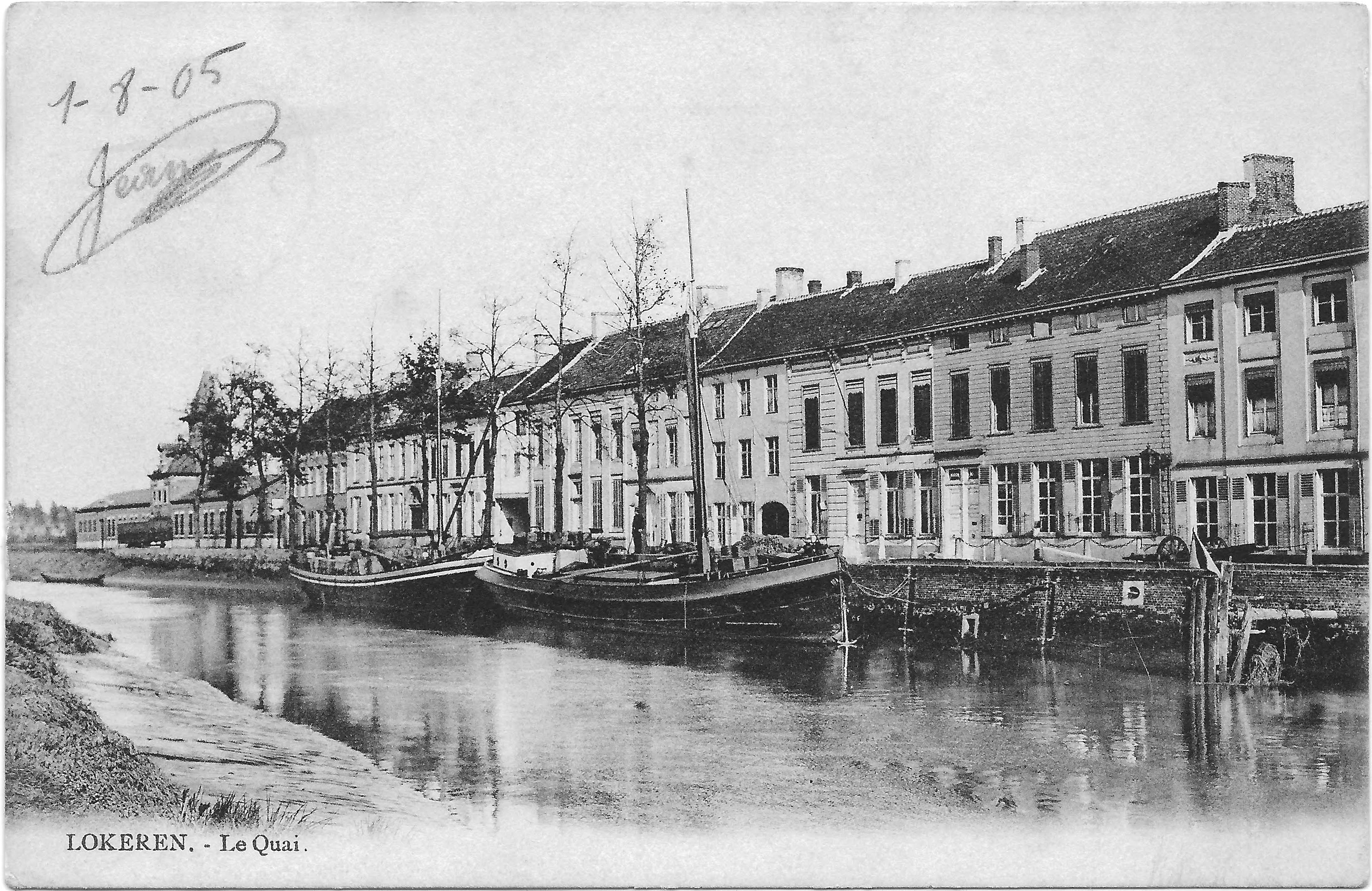 Briefkaart van de haven van Lokeren op de Durme rivier